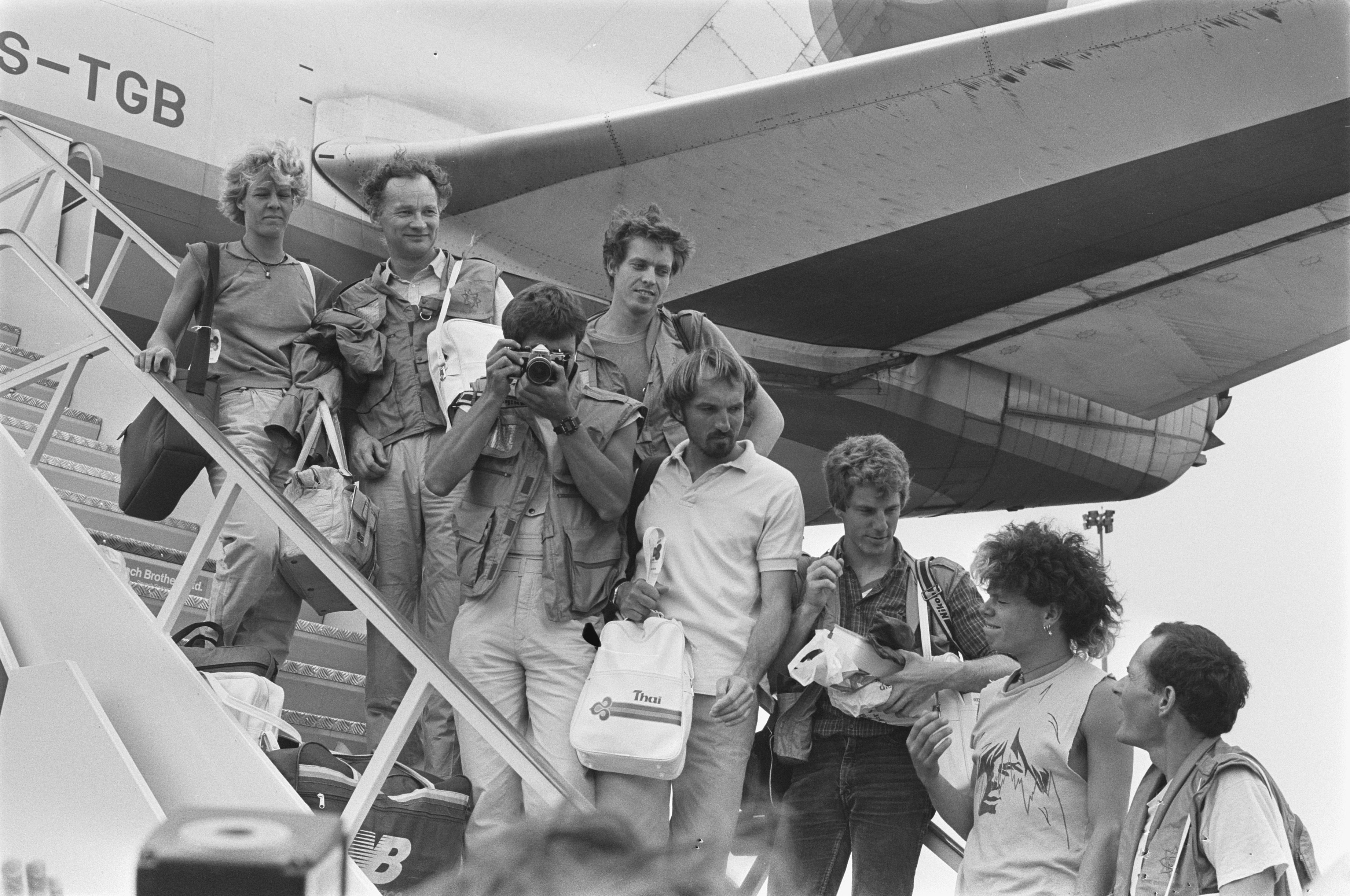 Collectie / Archief : Fotocollectie Anefo Reportage / Serie : [ onbekend ] Beschrijving : Vertrek Mount Everest Expeditie vanaf Schiphol; Bart Vos , Edmund Ofner , Han Timmers , Joost Ubiek , Edward Dekker Datum : 31 juli 1984 Locatie : Noord-Holland, Schiphol Trefwoorden : VERTREKKEN, expedities Persoonsnaam : Bart Vos, Edmund Ofner, Edward Bekker, Han Timmers, Herman Plugge, Joost Ubiek, Mount Everest Expeditie, Peter Teewissen Fotograaf : Bogaerts, Rob / Anefo Auteursrechthebbende : Nationaal Archief Materiaalsoort : Negatief (zwart/wit) Nummer archiefinventaris : bekijk toegang 2.24.01.05 Bestanddeelnummer : 933-0433